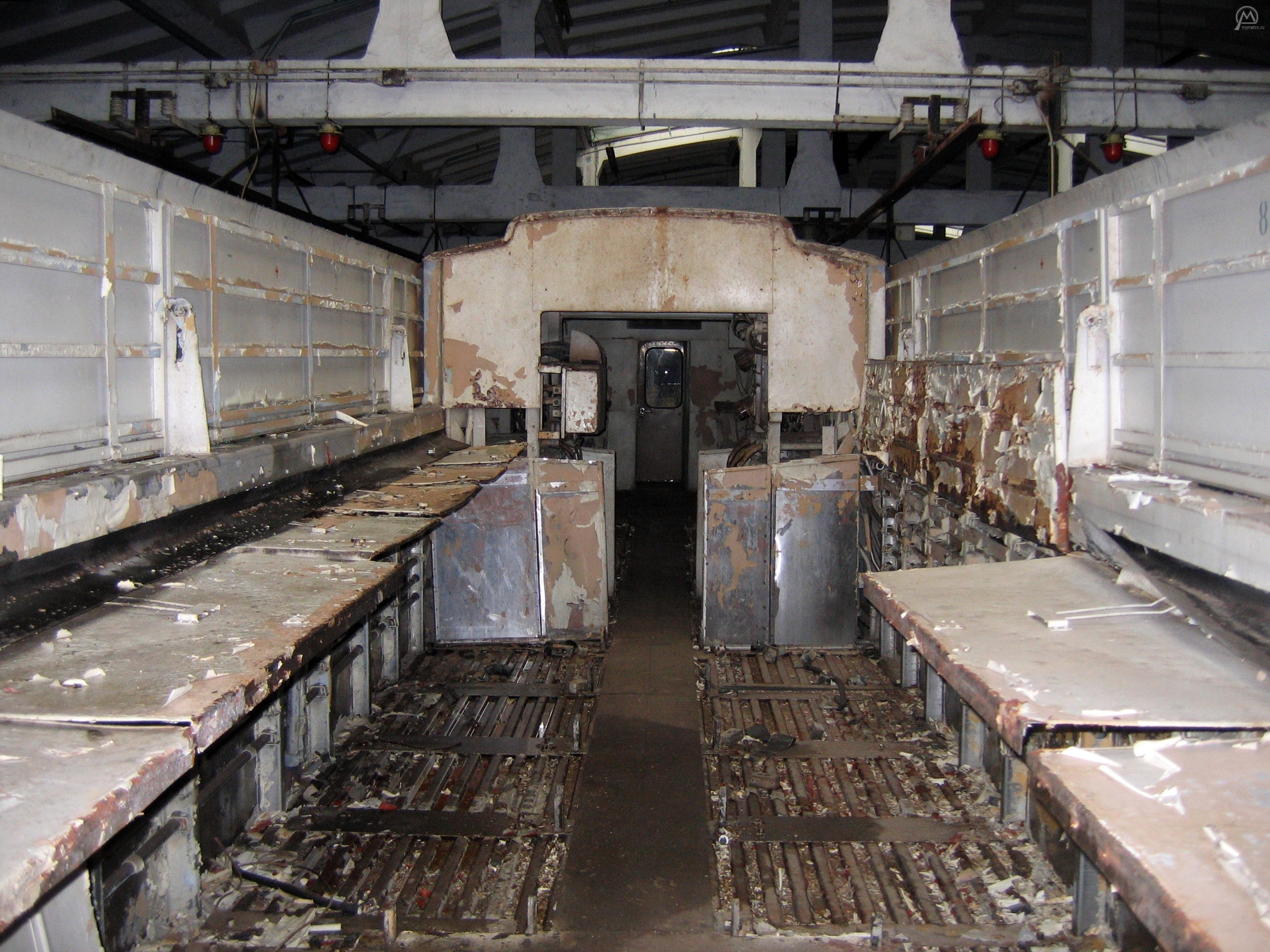 Машинное отделение контактно-аккумуляторного электровоза типа Л